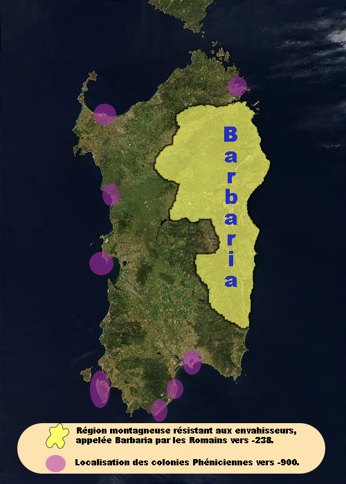 Je suis l'auteur de l'image. utilisation de Immagine:Sardinia satellite.jpg qui se trouve dans Sardegna Cette carte représente la région montagneuse de Sardaigne appelé Barbaria. Elle montre également les emplacements des colonies féniciennes.